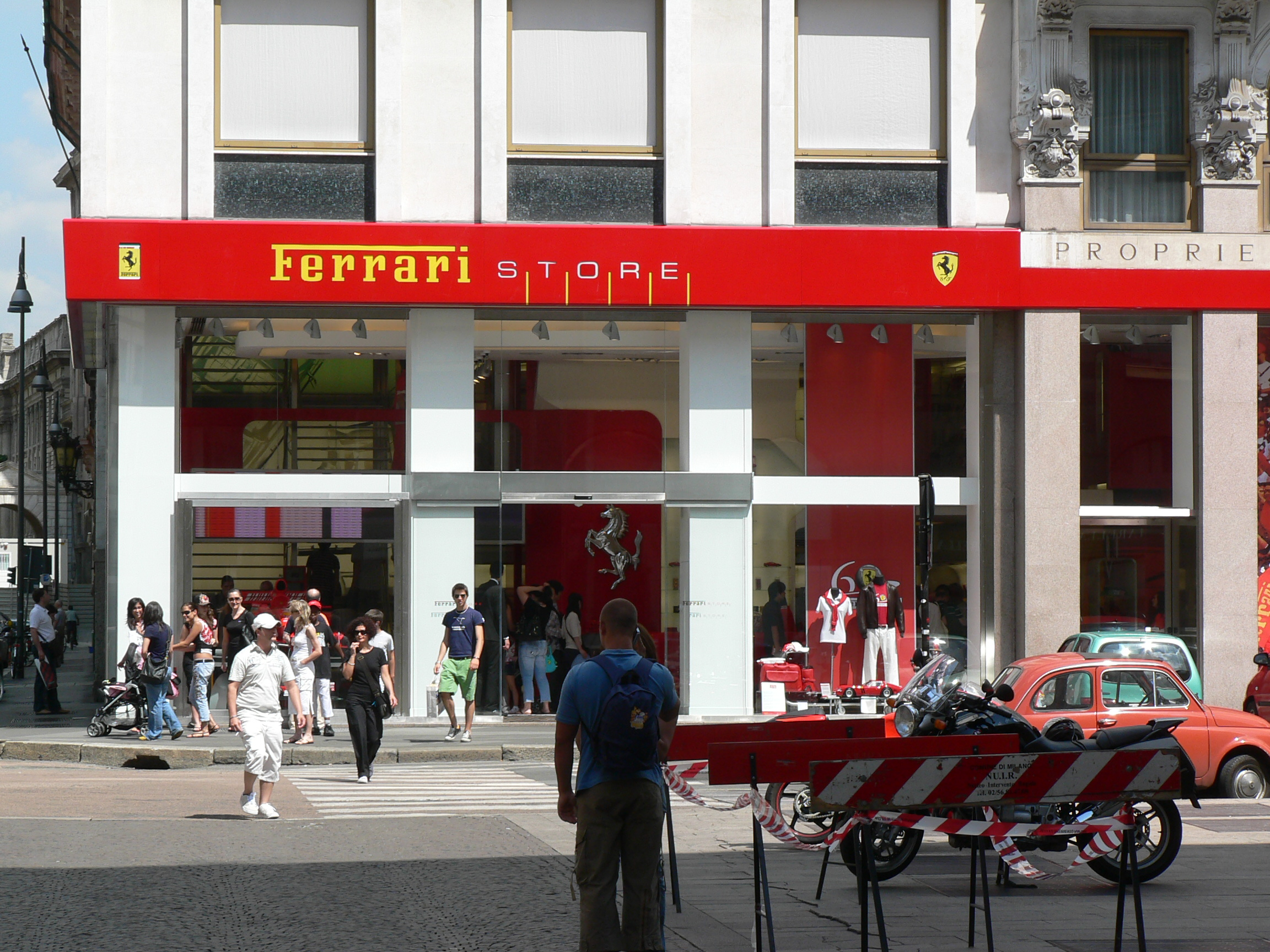 "Ferrari Store" in Piazzetta del Liberty a Milano.